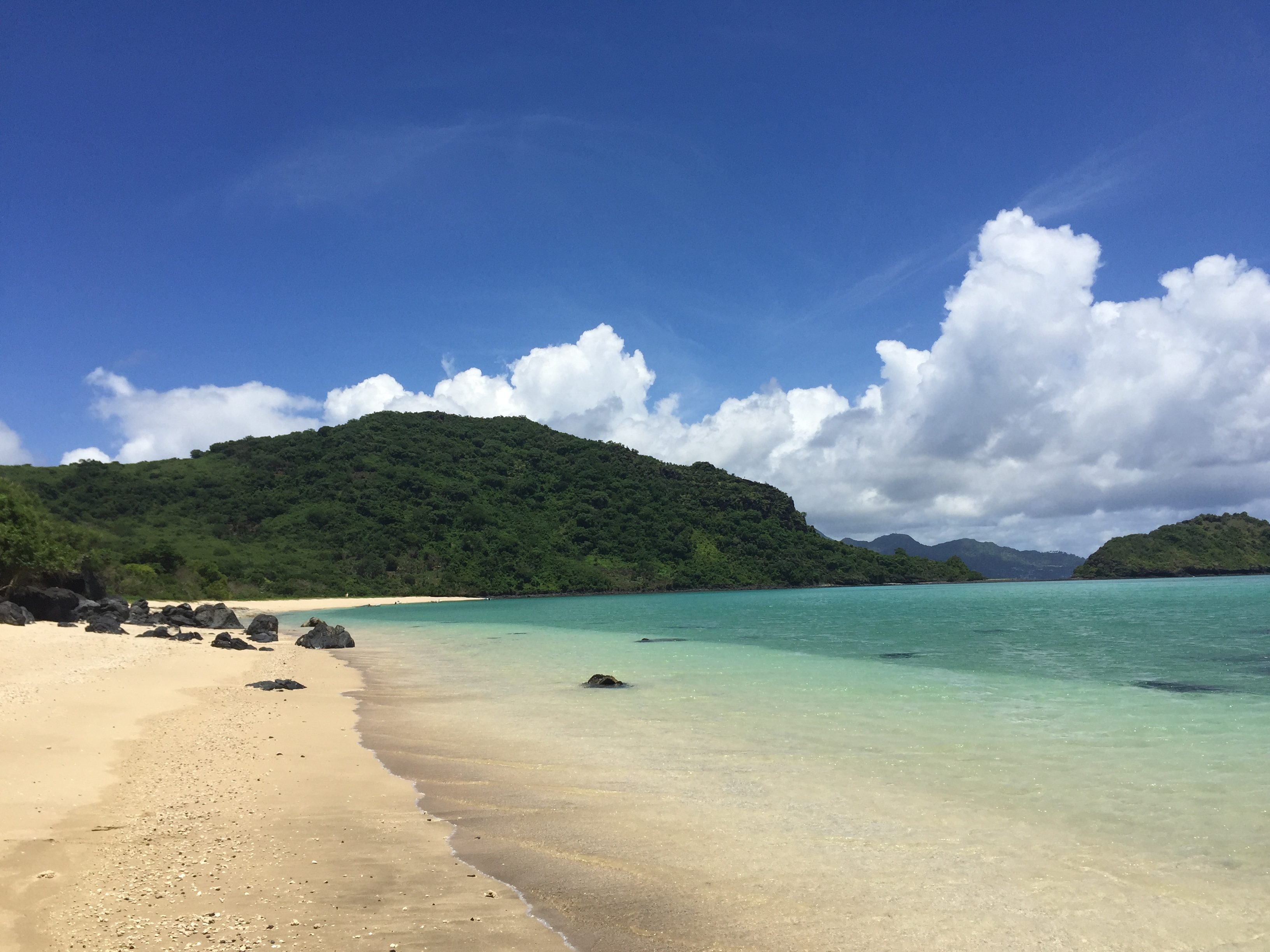 Ile de Chissioua Mtsamboro – Mayotte